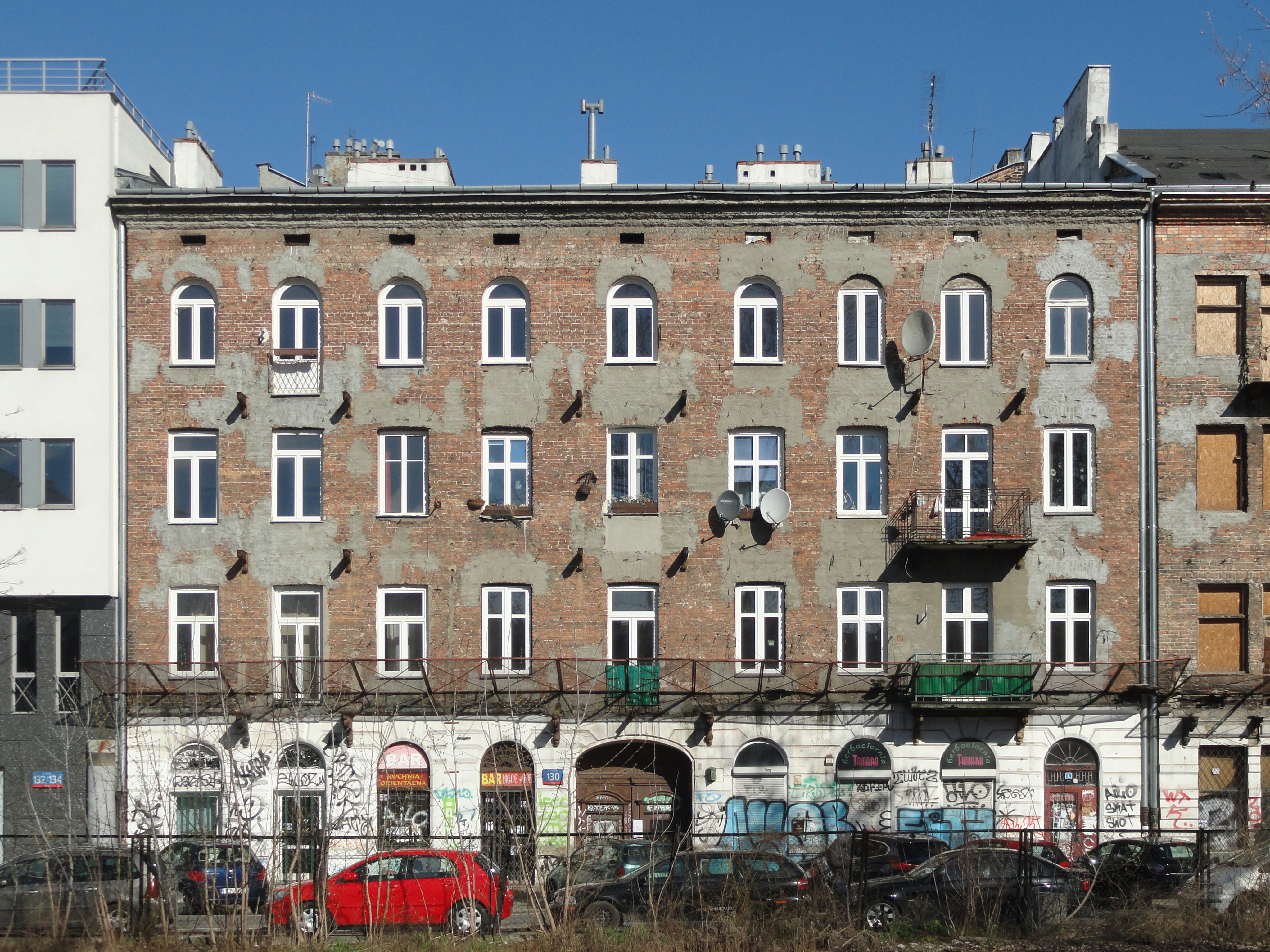 Kamienica Nisenszalów przy ulicy Chmielnej 130 w Warszawie.